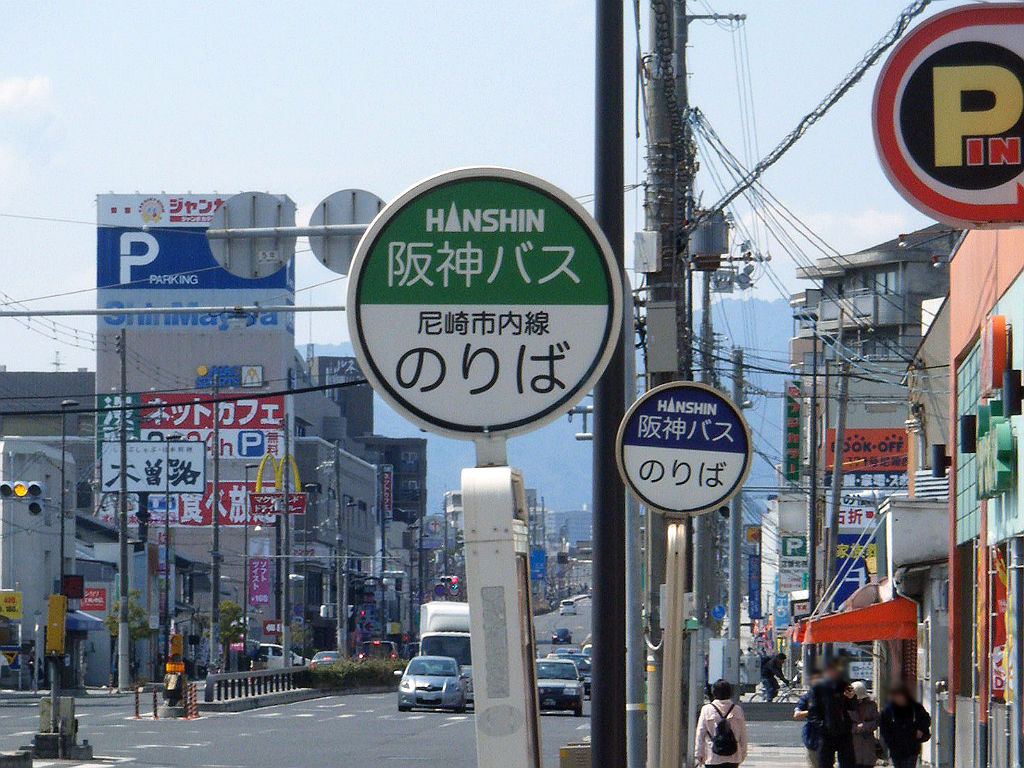 阪神バス・西大島バス停標柱。手前は尼崎市内線（旧尼崎市バス）用。